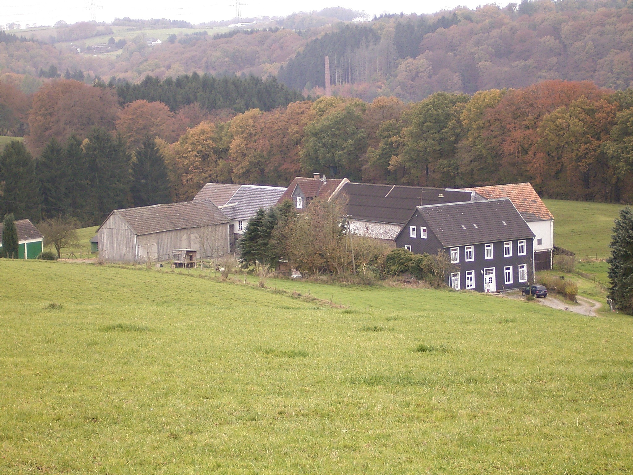 Radevormwald